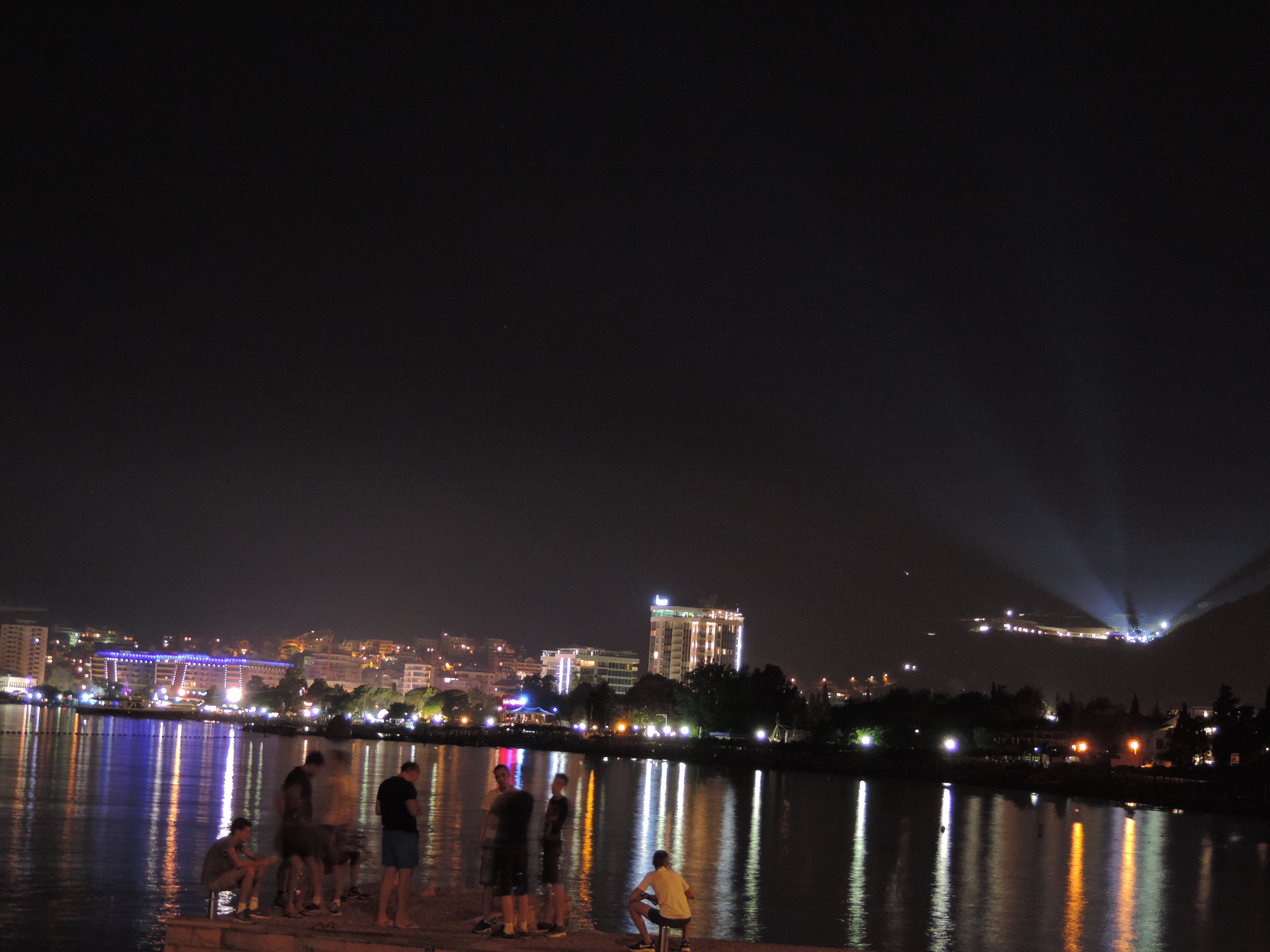 Budva